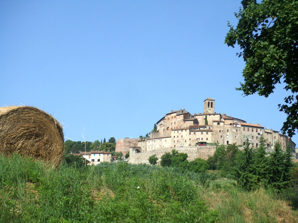 Anghiari Toscane - Italie